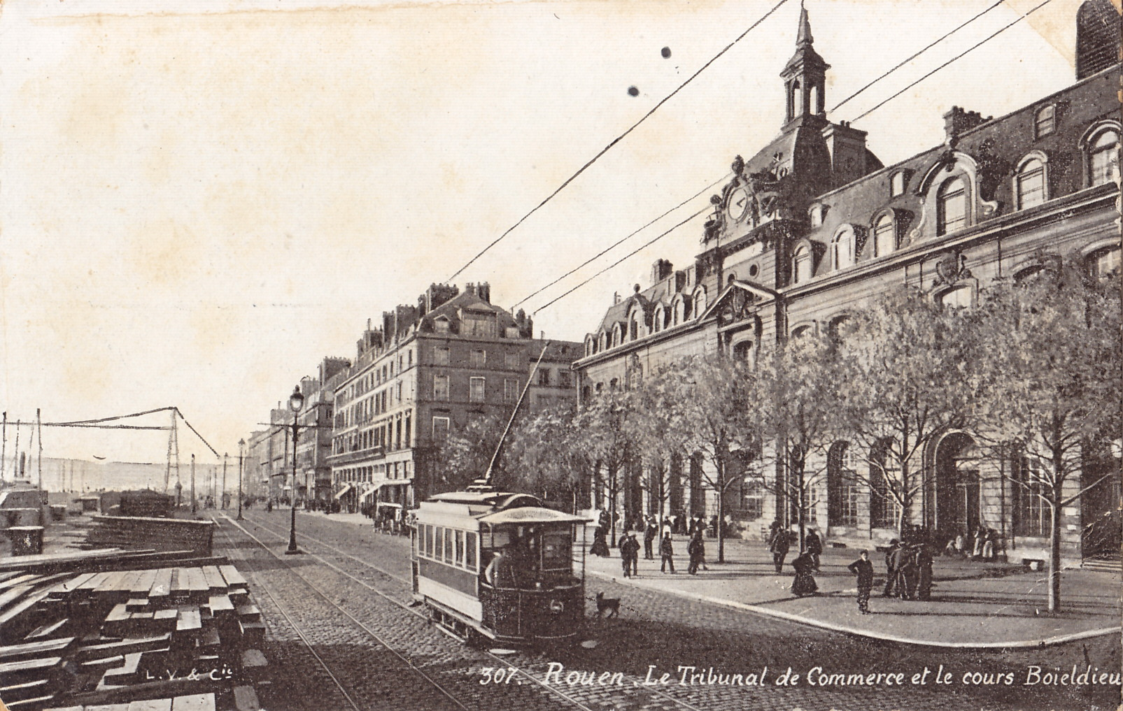 Carte postale ancienne éditée par L. V. et Cie, n°307 : ROUEN - Le Tribunal de Commerce et le cours Boieldieu